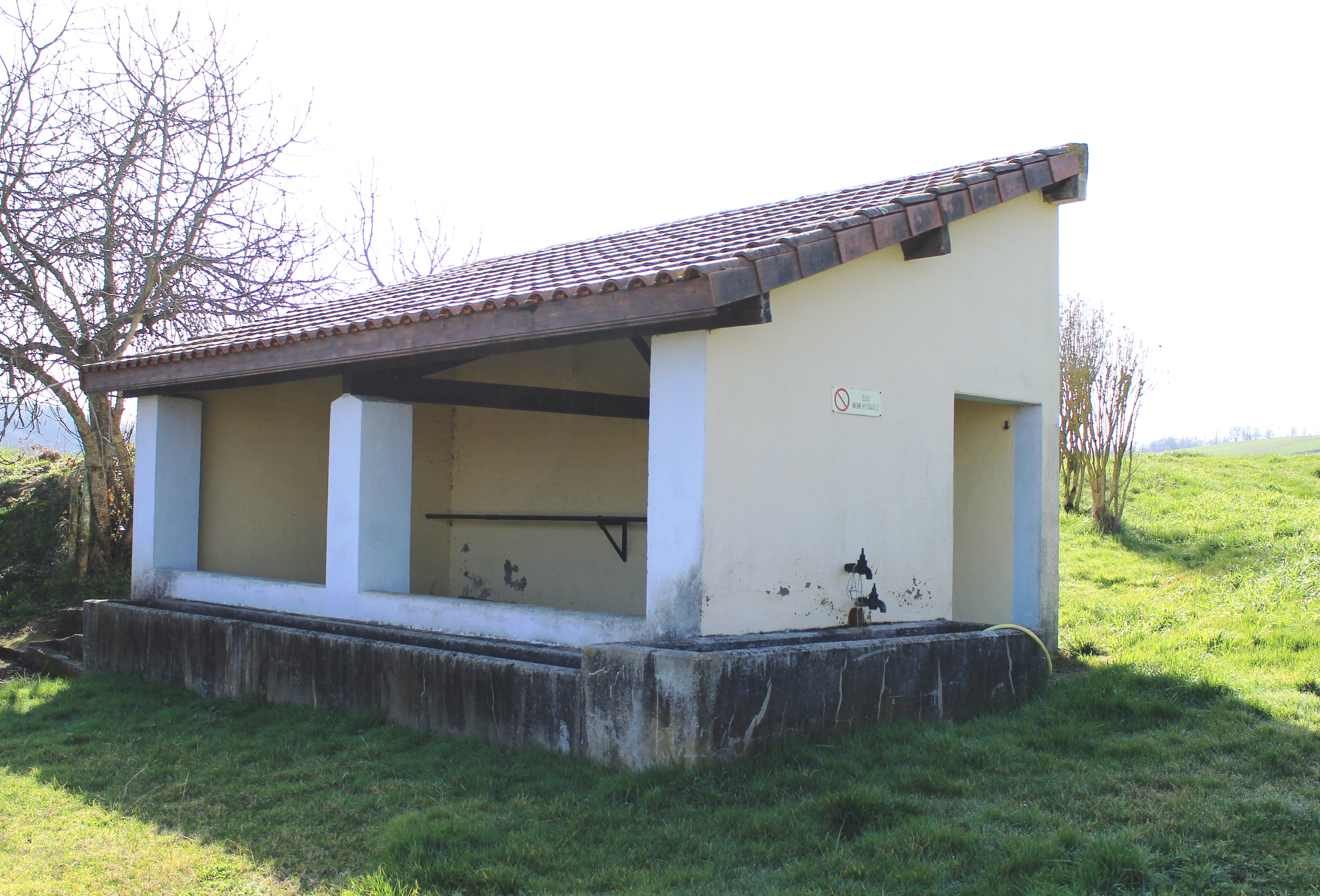 Lavoir de Moumoulous (Hautes-Pyrénées)